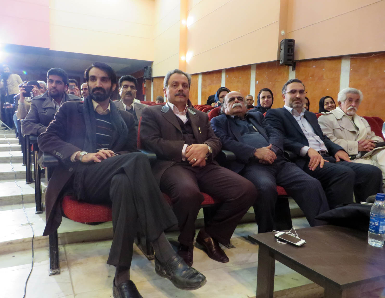 نخستین همایش بهار کردی کرمانشاه بهمن 1393